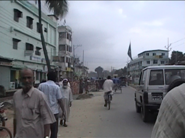 Sherpur Road, Bogra Sadar, Bogra, Bangladesh.